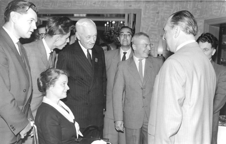 Zentralbild-Zühlsdorf Ber-Noa 6.6.1960 Cyrus S. Eaton im Haus der Wissenschaft in Leipzig Der in der DDR weilende amerikanische Großindustrielle und Lenin-Friedenspreisträger Cyrus Eato traf am 4.6.1960 zusammen mit seiner Gattin in der Messestadt Leipzig ein. Nach dem Besuch der 8. Landwirtschaftsausstellung am Nachmittag gab der Oberbürgermeister von Leipzig zu Ehren der amerikanischen Gäste im Haus der Wissenschaft ein Essen, an dem u.a. der Leiter des Gewandhausorchesters, Prof. Konwitschny, teilnahm. UBz: Angeregte Unterhaltung im Haus der Wissenschaften zwischen Cyrus Eaton (3.v.l.) und Prof. Konwitschny (rechts). Sitzend die Gattin Mr. Eatons.